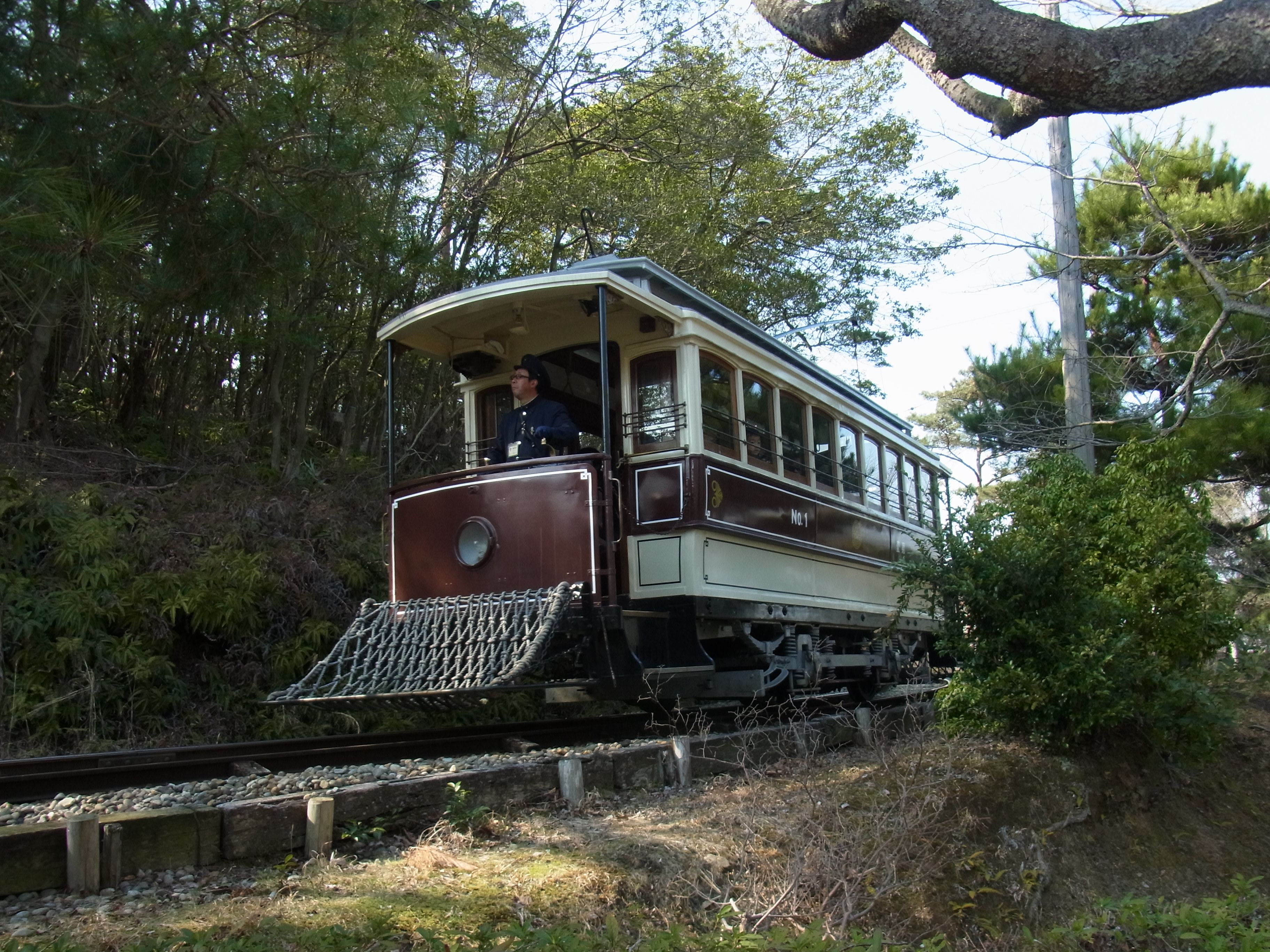 明治村、旧京都市電